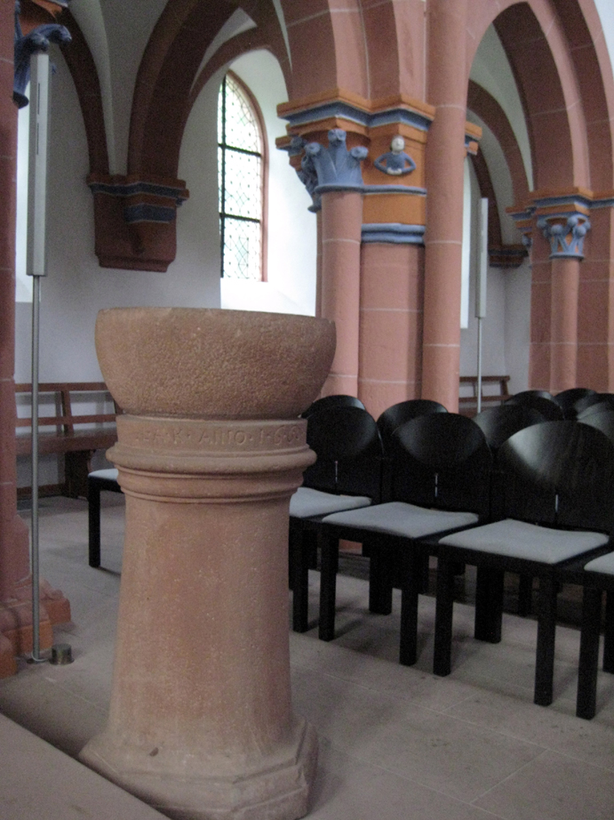 Kirche zu Geiß-Nidda, Taufstein